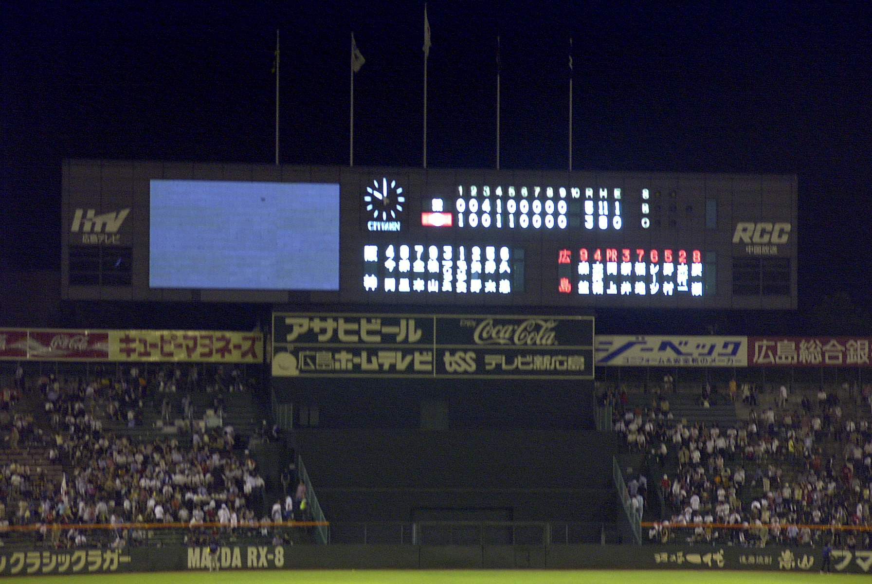 2003年7月、本人撮影、広島市民球場 2004年11月14日 (日) 21:02 . . Taisyo . . 680×455 (59,856 バイト)